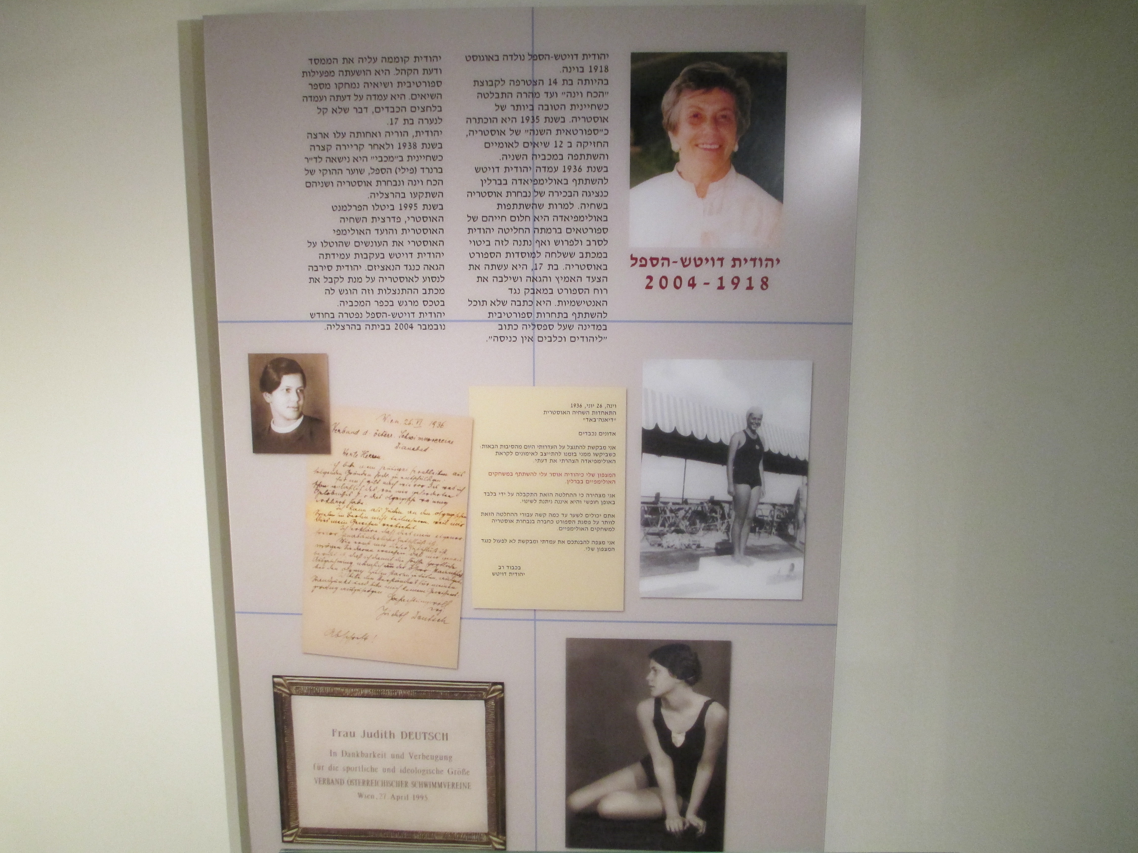 פינת הנצחה לשחיינית יהודית דויטש-הספל במוזיאון מכבי ברמת גן